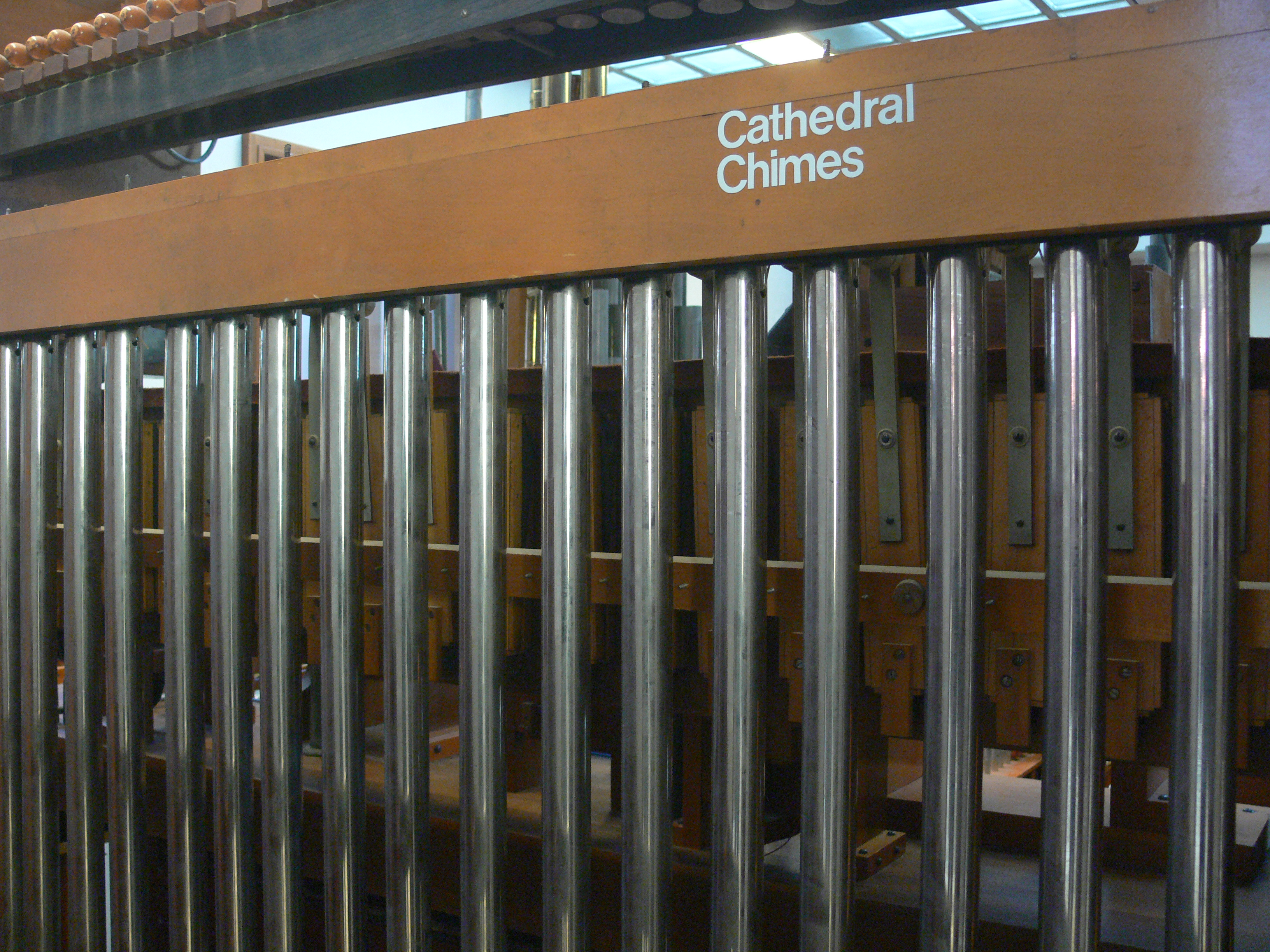 Mighty Wurlitzer, Musikinstrumenten-Museum Berlin Chimes